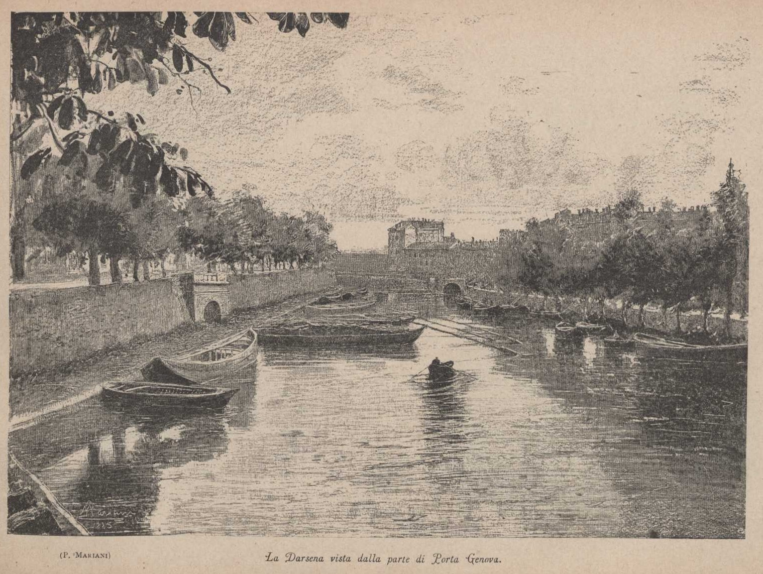 La Darsena vista da Porta Genova tratto da l naviglio : strenna del Pio Istituto dei Rachitici di Milano